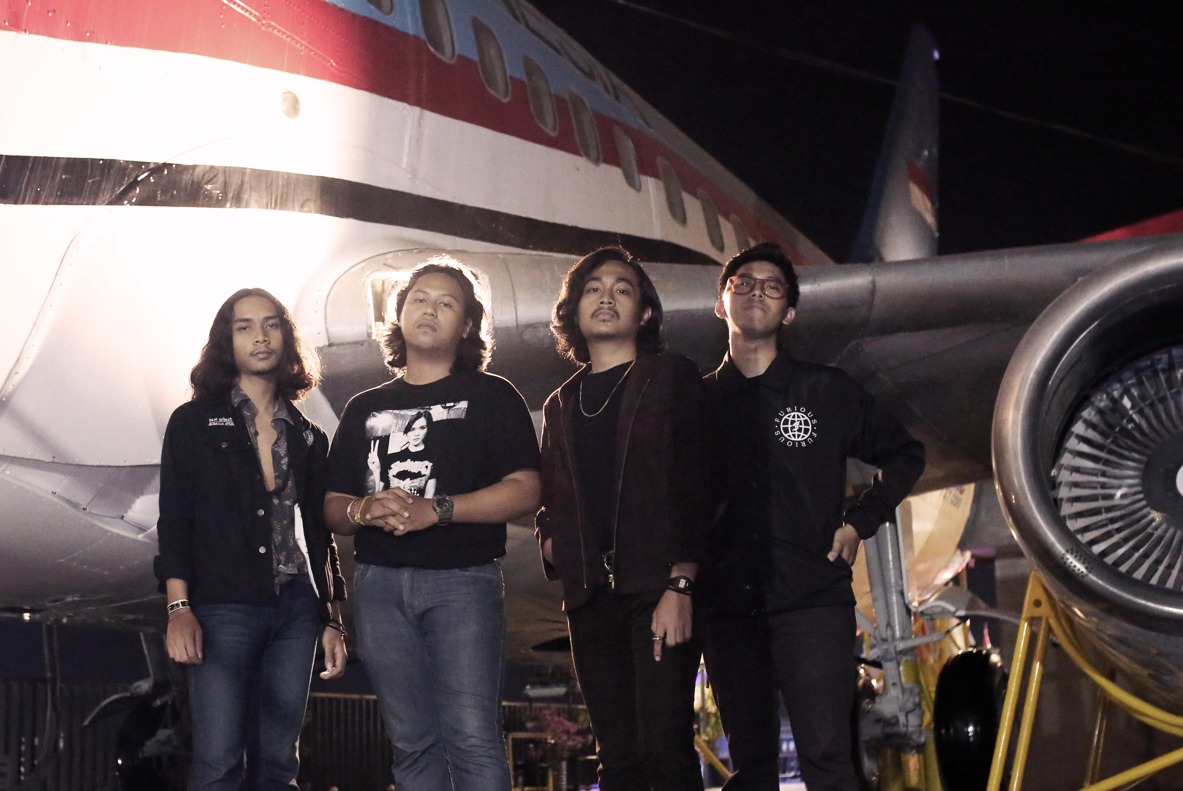 White Swan Full Member Photos